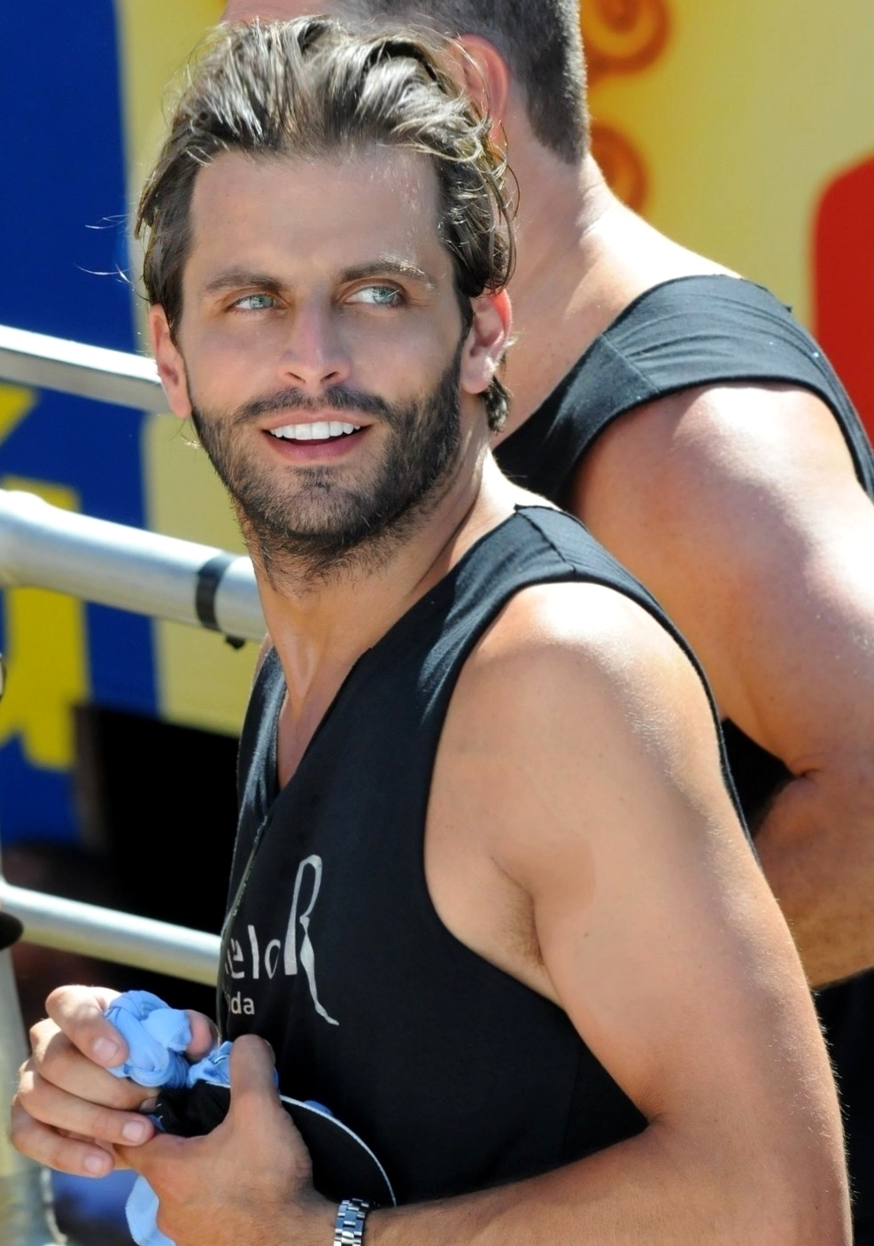 Português do Brasil: O ator Henri Castelli no carvanal de Salvador.